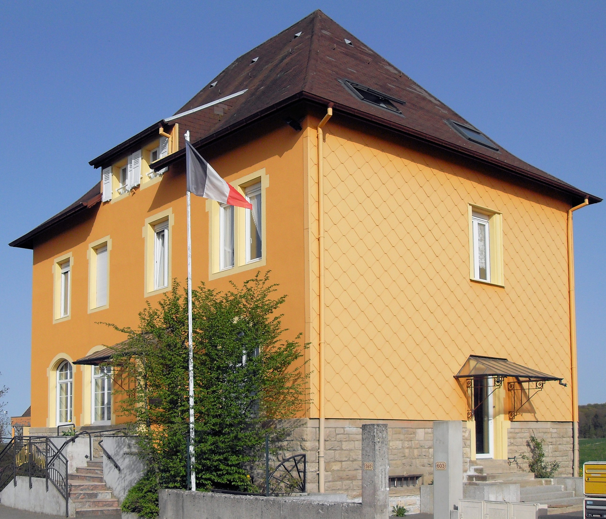 La mairie et le foyer communal de Valdieu-Lutran